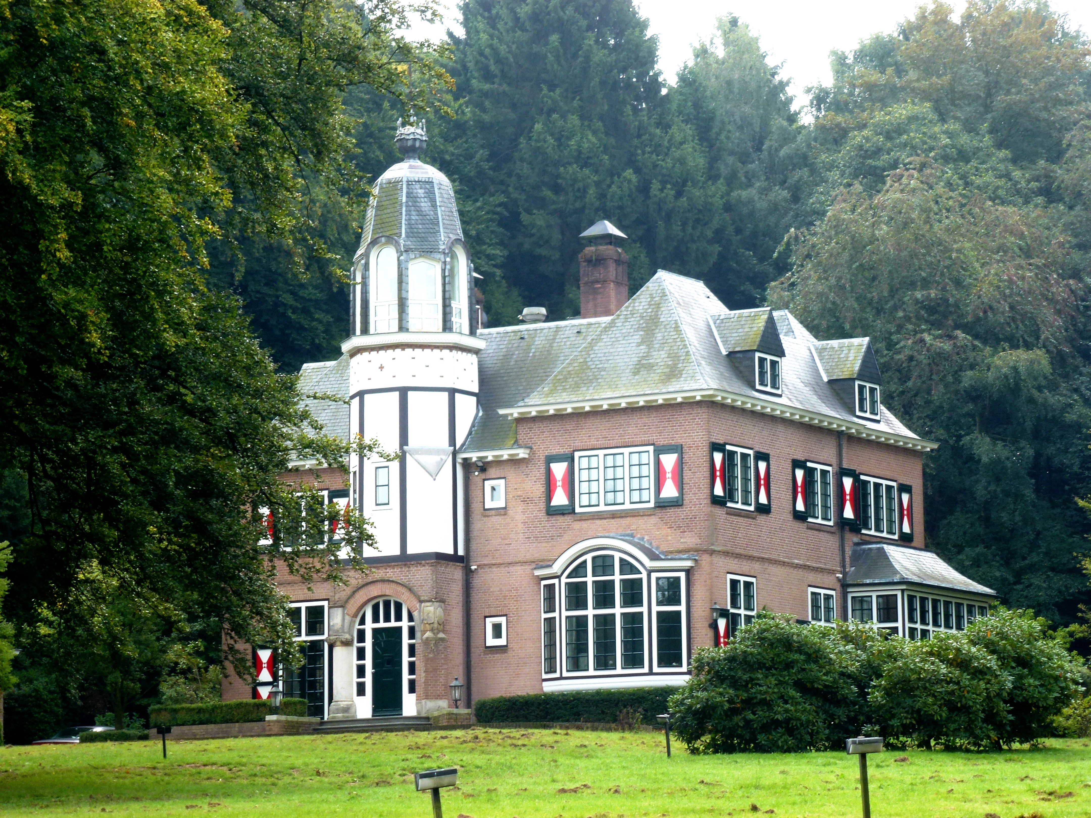 Berg en Dal (Groesbeek) Meerwijkselaan 9